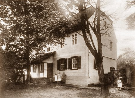 Pfarrhaus in Röcken um 1900. Frei zugänglich, da Schutzdauer abgelaufen und Fotograf nicht bekannt.